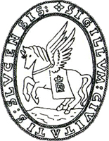 Беларуская (тарашкевіца): Герб Слуцку (Słucak) на пячатцы магістрату